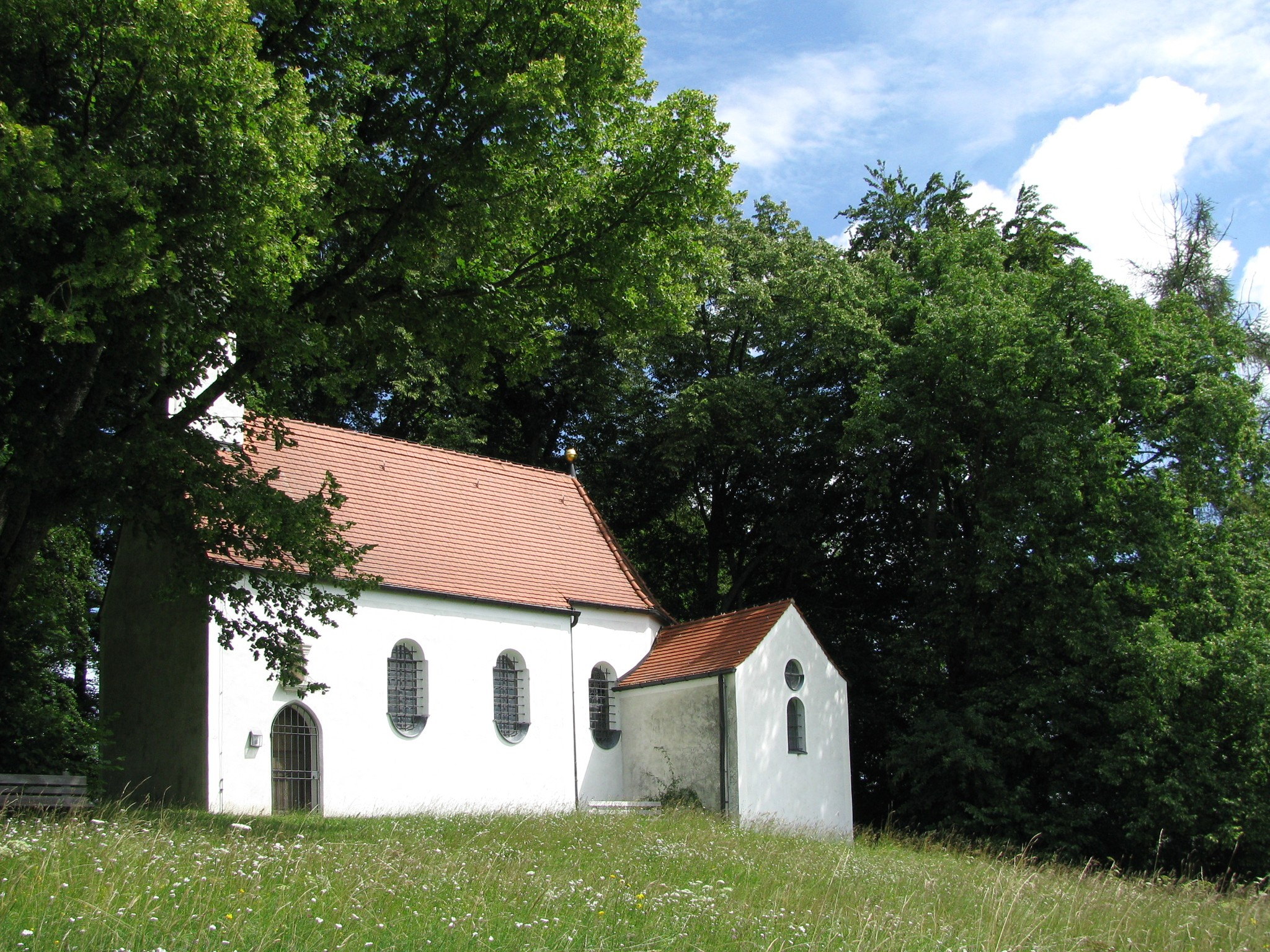 Kapelle St. Koloman bei Weipertshausen in der Gemeinde Münsing